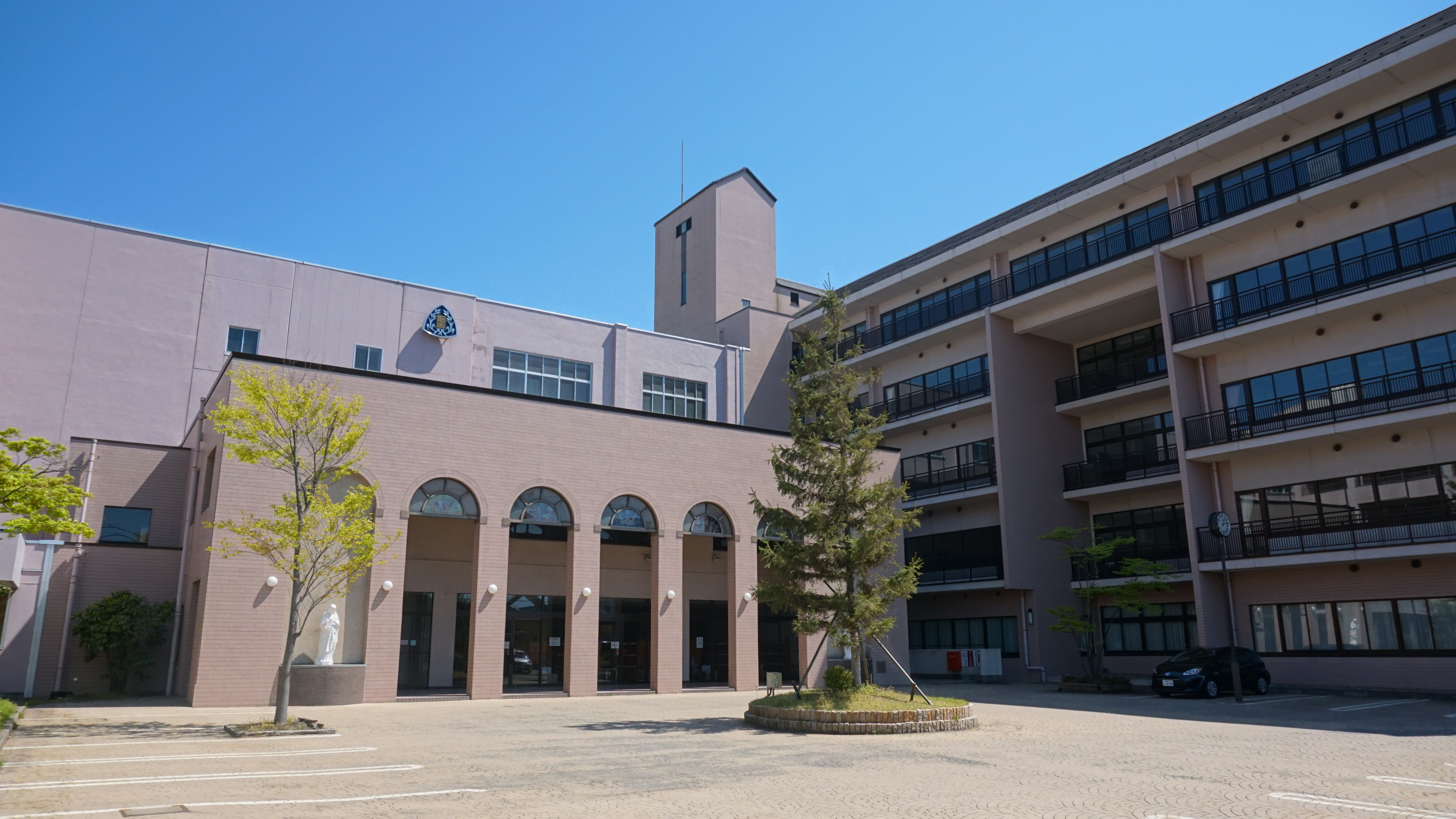 聖霊女子短期大学付属高等学校（秋田市南通）